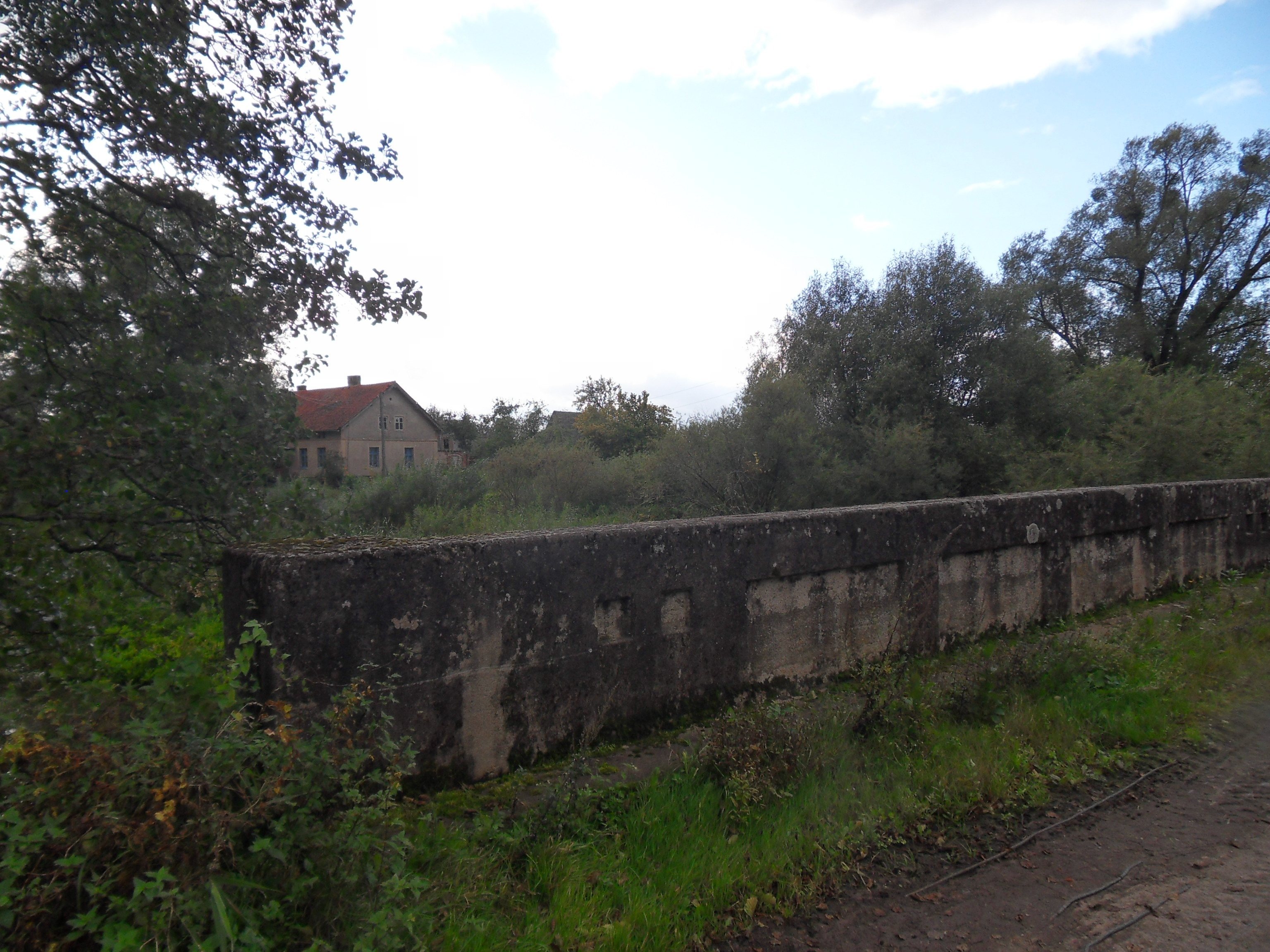 Blick von der Brücke über die Swine auf den ehem. südlichen Teil des Dorfes